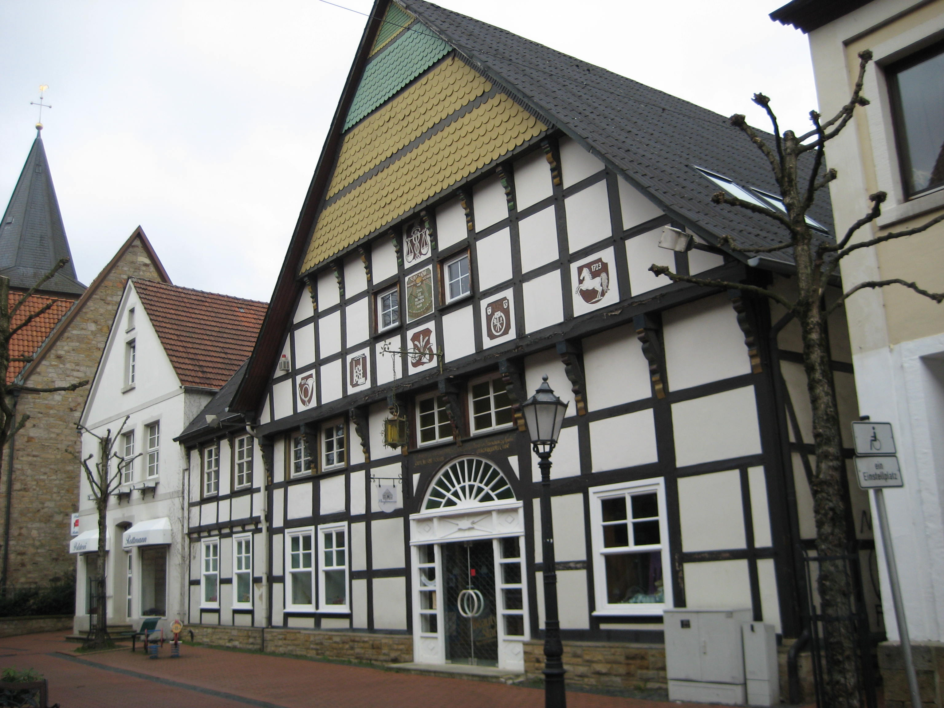 Fachwerkhaus in der Dorfstraße von Hagen am Teutoburger Wald (Dorfstraße)